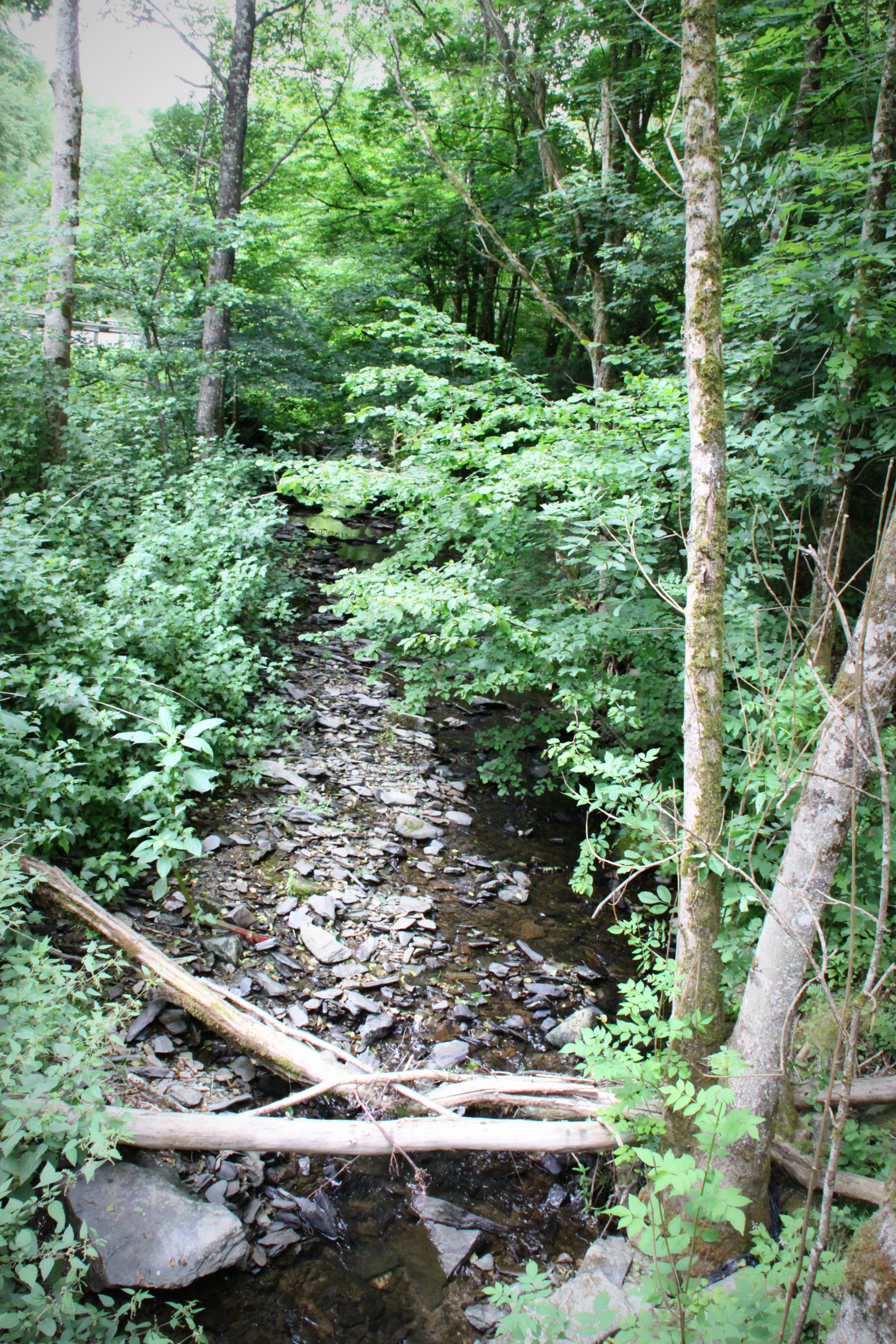 D'Schlibech tëscht Bidscht an dem Heischtergronn